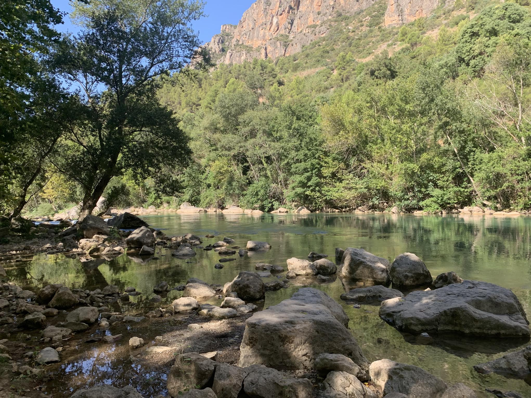 Riu Segre derprès de l'aiguabarreig amb la Noguera Pallaresa, aproximadament 1 km desprès.